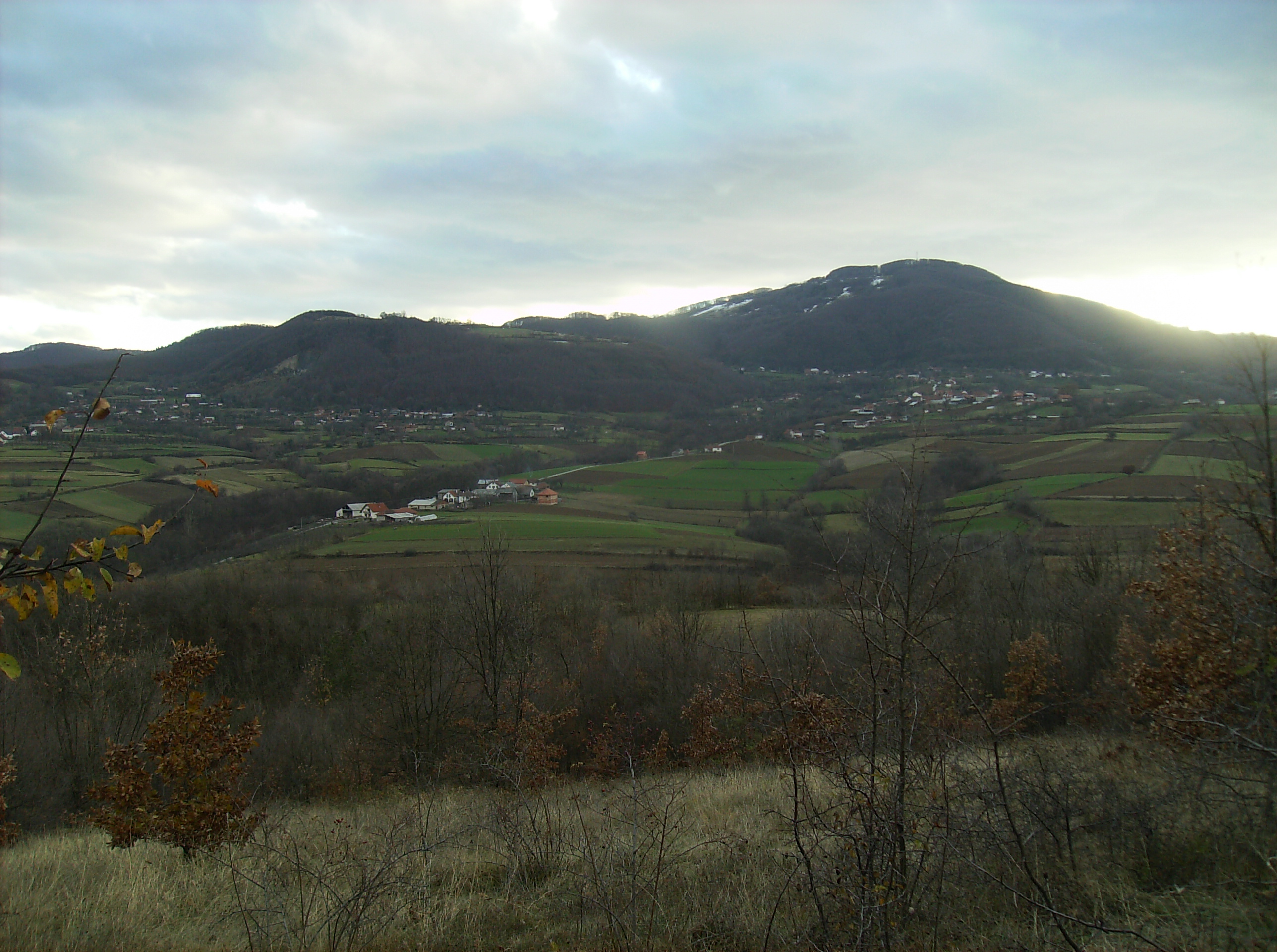 Crni vrh, najviši vrh Ješevca i selo DOnja Vrbava. Licno sam napravio ovu fotografiju.